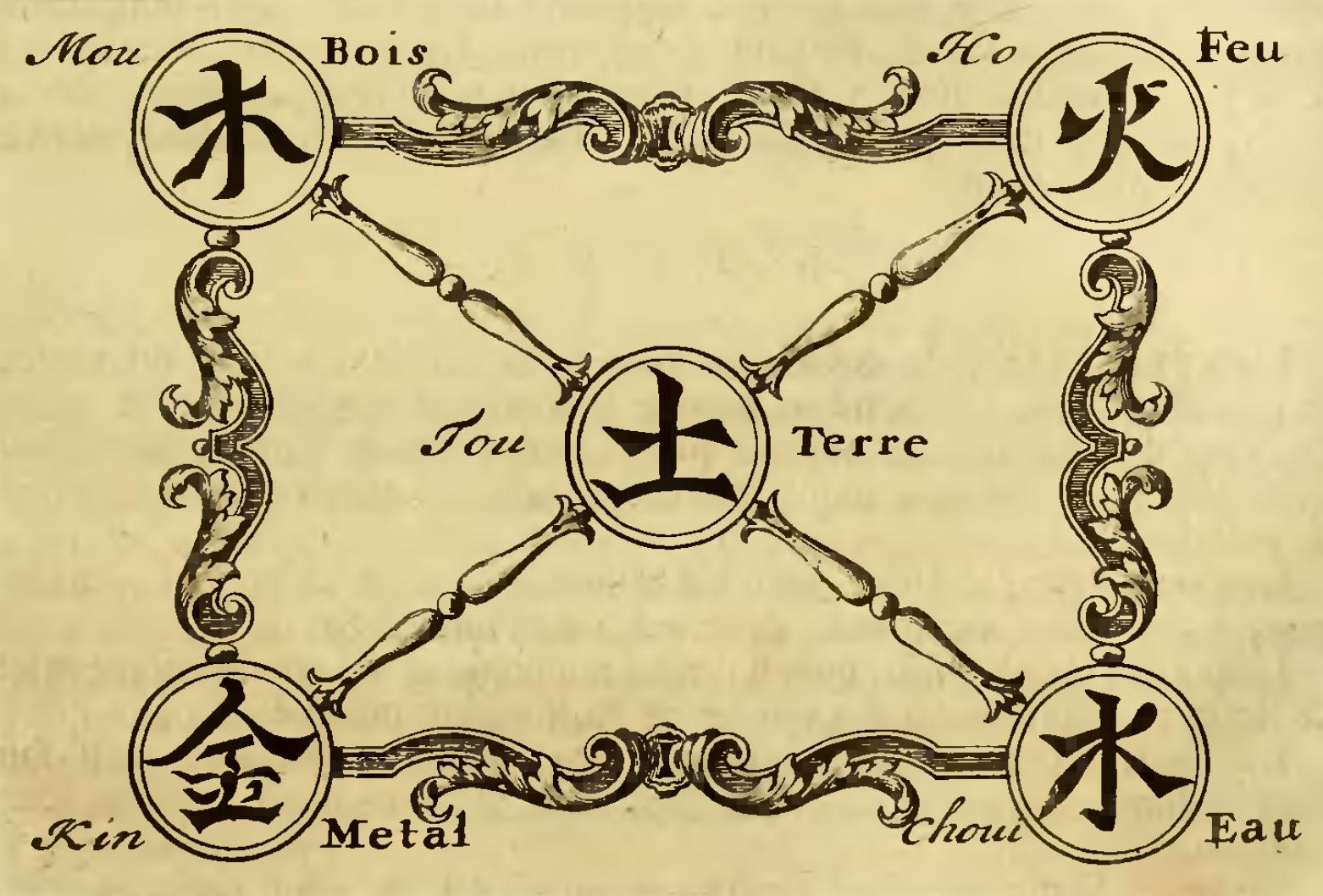 Gravure extraite de Description de la Chine, édition de La Haye 1736. Volume 3. Page 471. Table des Cinq Eléments.